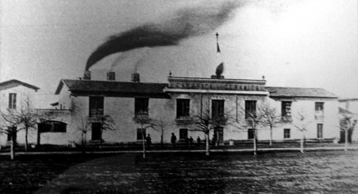 Stabilimento per la produzione di ceramiche realizzato nel 1908 da Giampieri Francesco